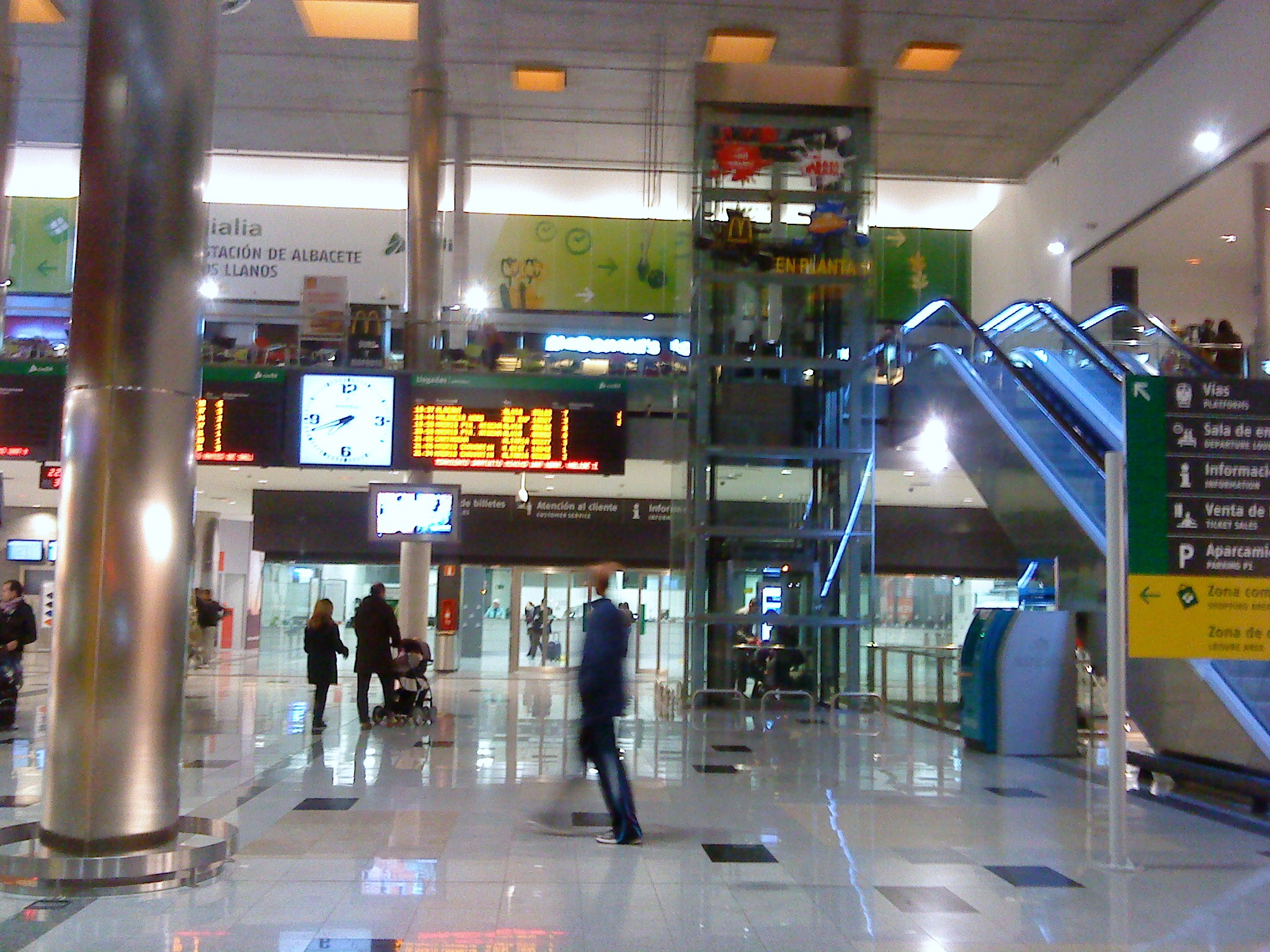 Interior de la Estación de ferrocarril de Albacete-Los Llanos (España)